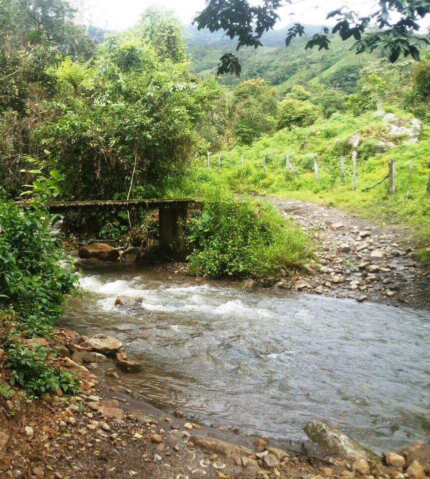 puente en la labrazagrande en la vereda de ochica